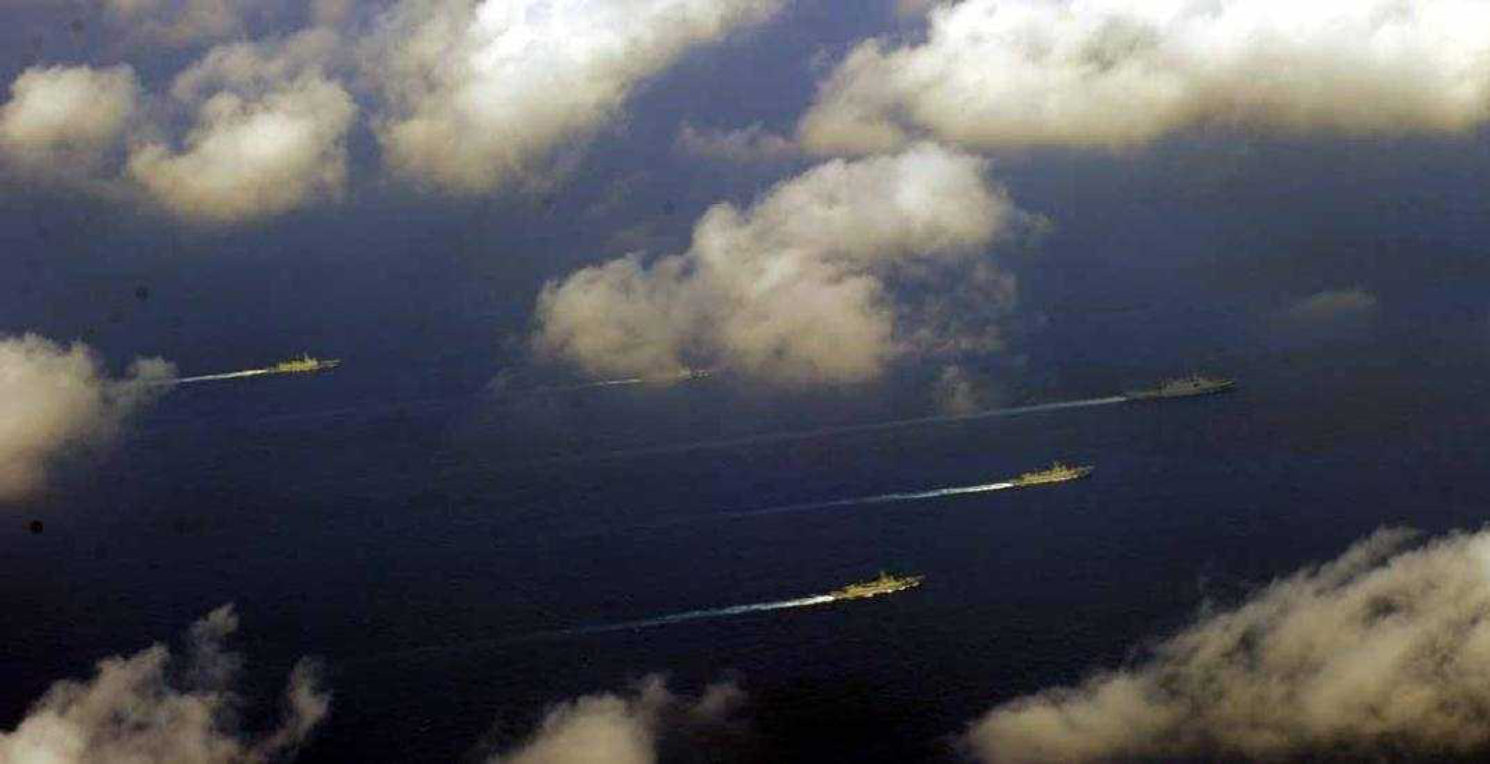 ５月６日（日）午前６時頃、海上自衛隊第５航空群（那覇）所属「Ｐ－３Ｃ」が、沖縄本島の南西約６５０ｋｍの海域を太平洋に向けて南東進する中国海軍のルーヤンI級ミサイル駆逐艦２隻、ジャンカイII級フリゲート２隻及びユージャオ級揚陸艦１隻の合計５隻を確認した。 このうち、ルーヤンI級ミサイル駆逐艦及びユージャオ級揚陸艦は、海上自衛隊において初めて確認したものである。また、沖縄本島南西約６１０ｋｍの海域において艦載ヘリコプターの飛行及び陣形運動を行っていたことが確認されている。